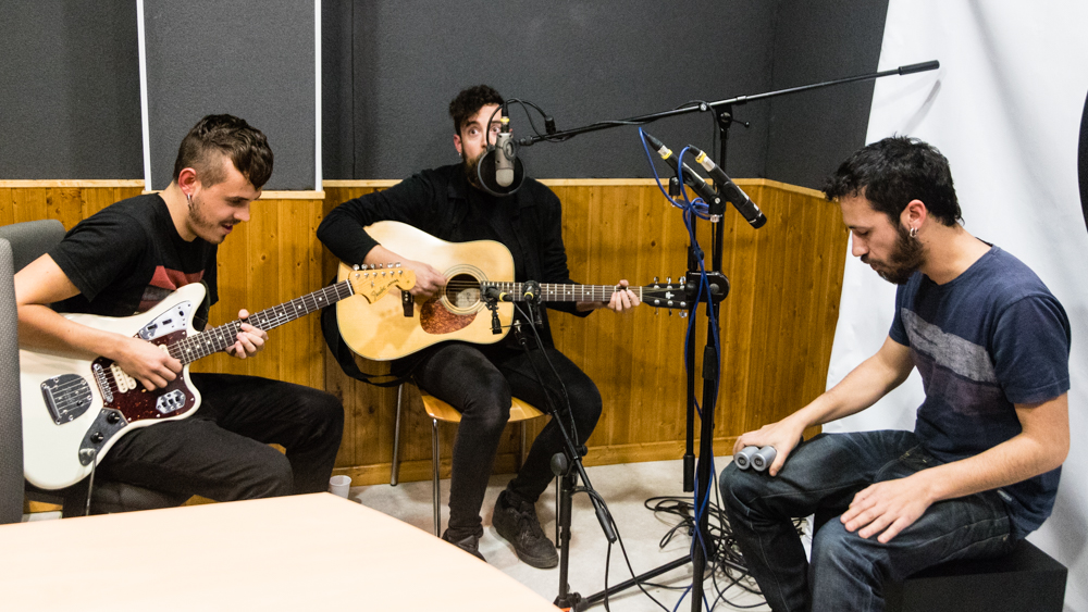 Smoking Souls a Territori Sonor, À Punt Mèdia.